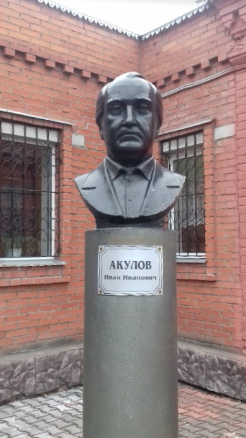 Память